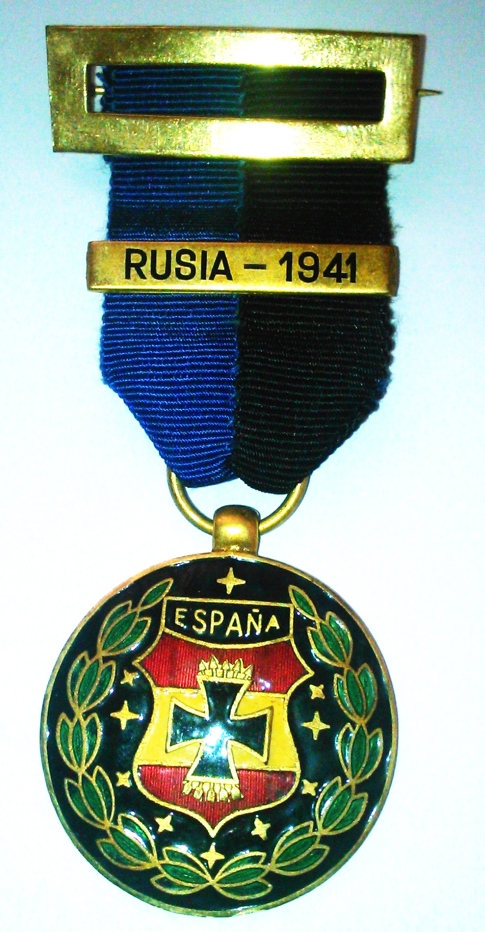 Una de las medallas que otorgaba España a los caídos de la División Azul 1941-1943